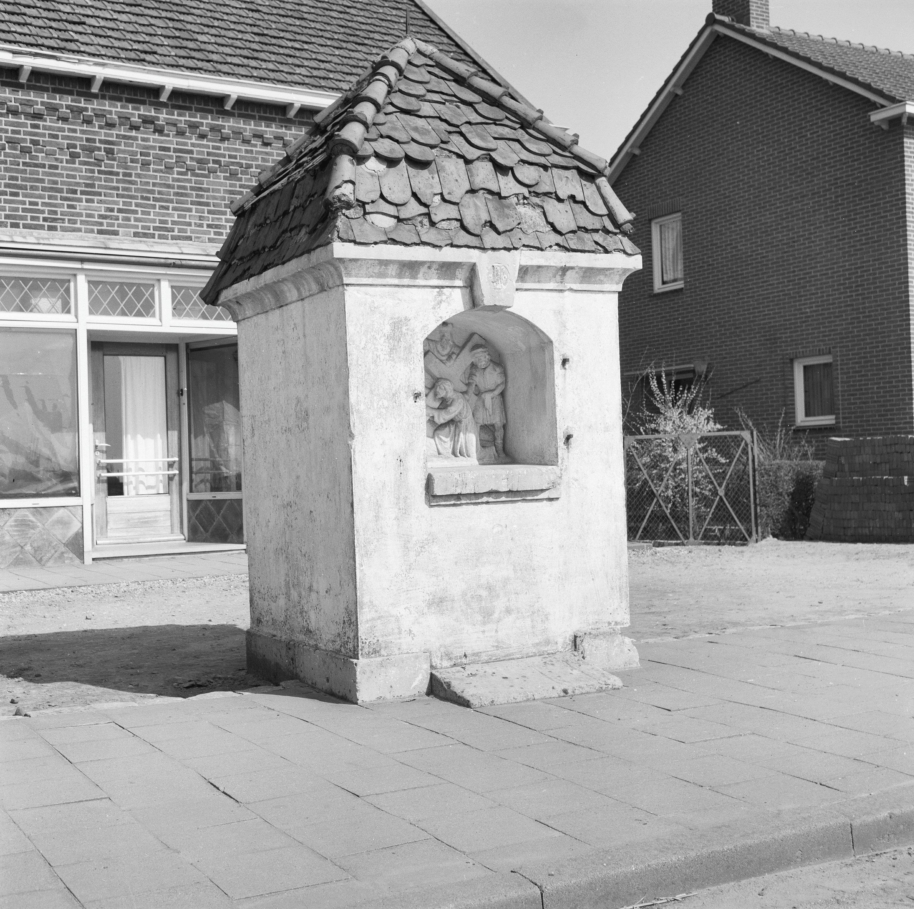 Kapelletje Der Zeven Voetvallen 1 T/M 7: nr.2, aanzicht